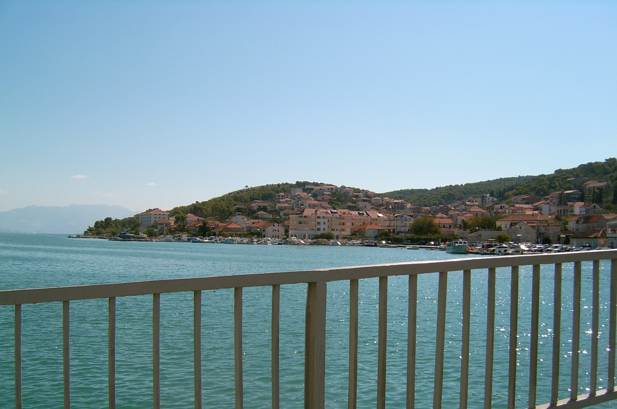 Chorwacja, Trogir